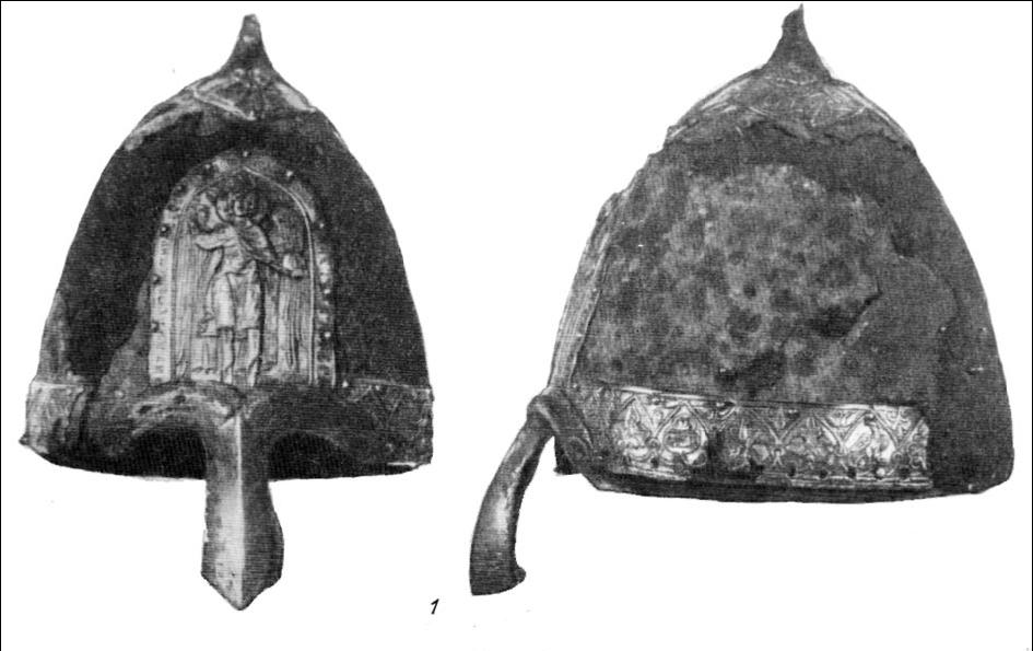 Шлем из Лыково, XII век